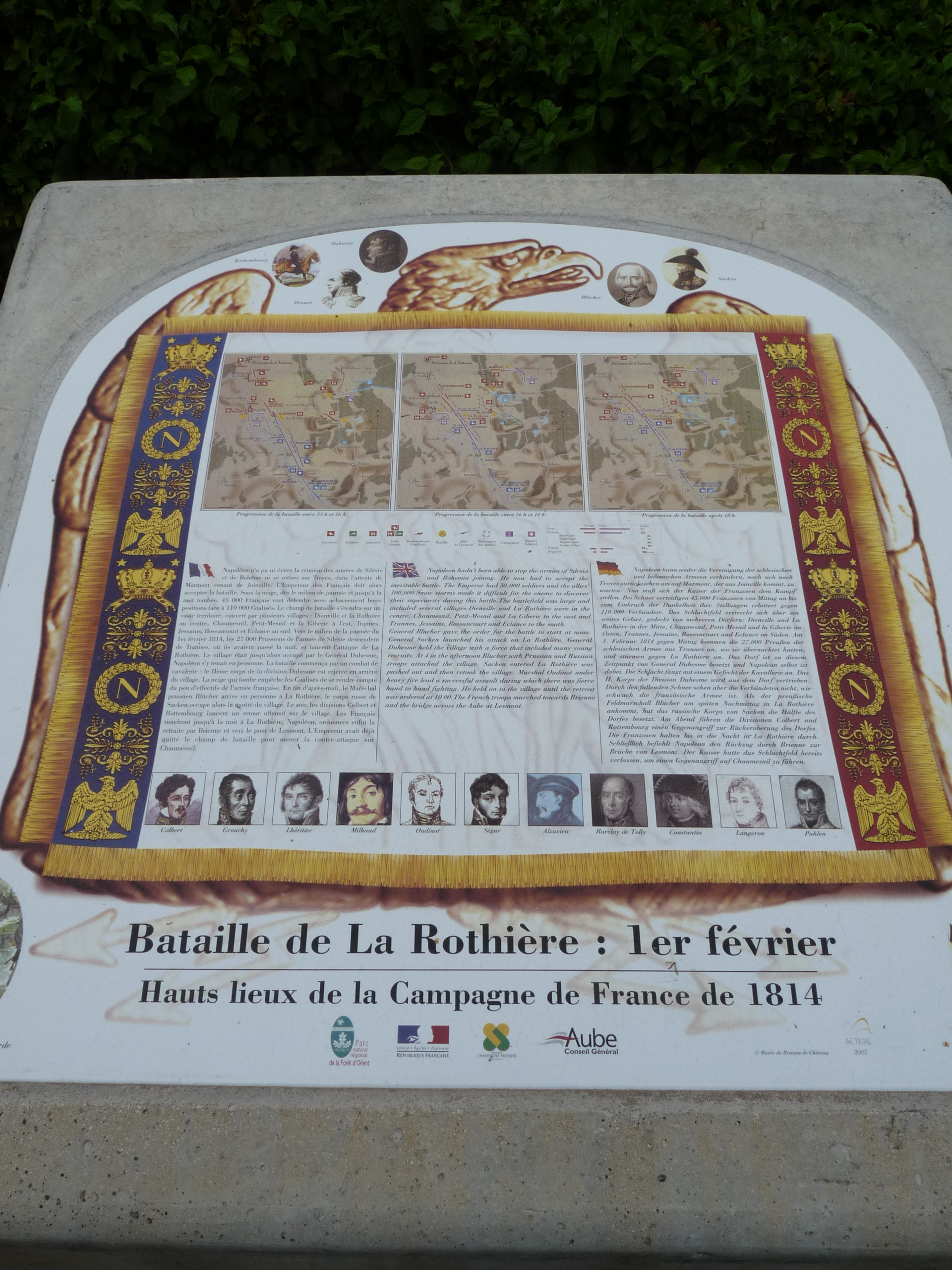 Gedenkstein an die Schlacht bei La Rothère a, 1.2.1814 in La Rothière